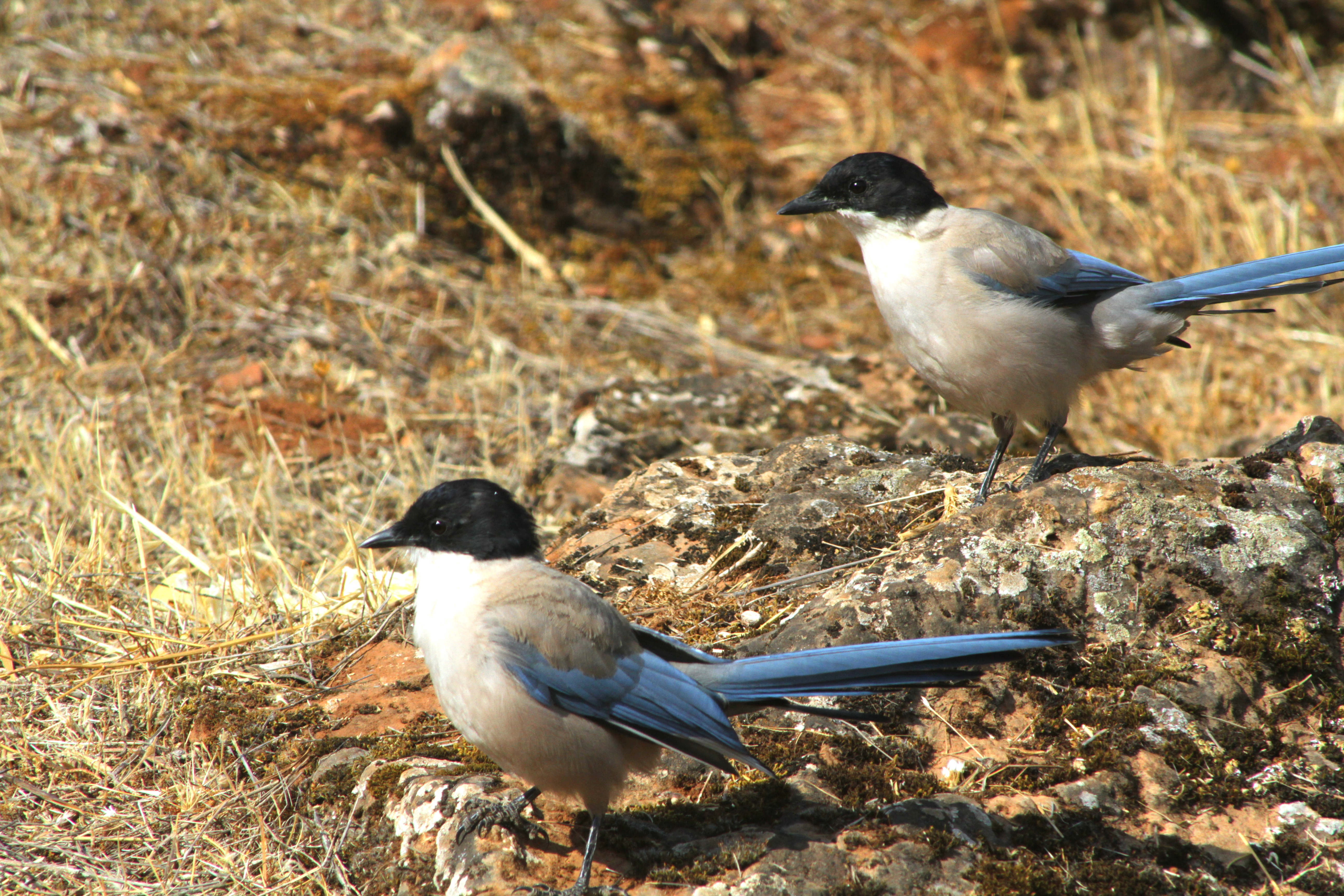 Rabilargo / Iberian Magpie Cyanopica cooki, Caceres, Extremadura, Spain